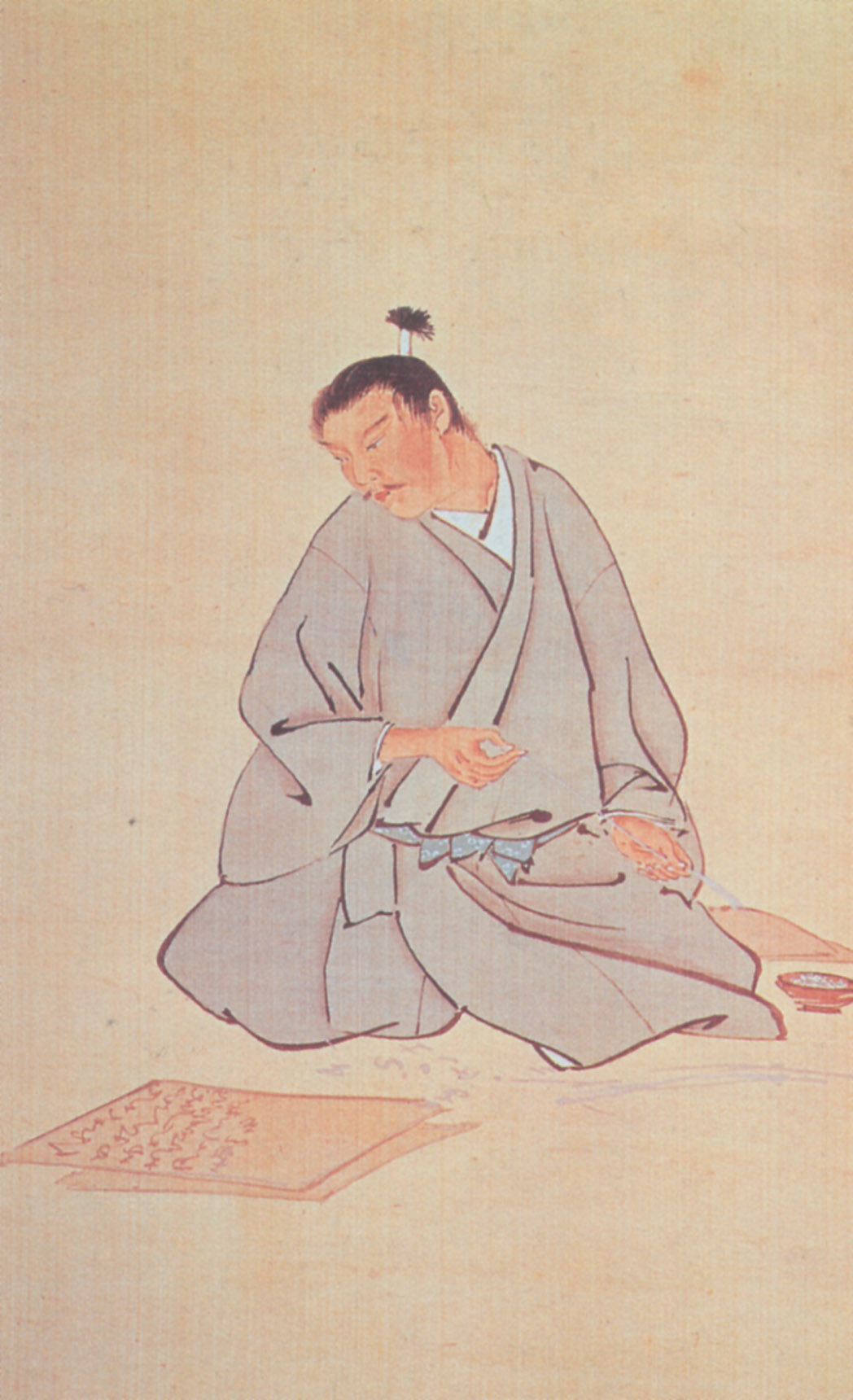 平野国臣 Hirano Kuniomi.